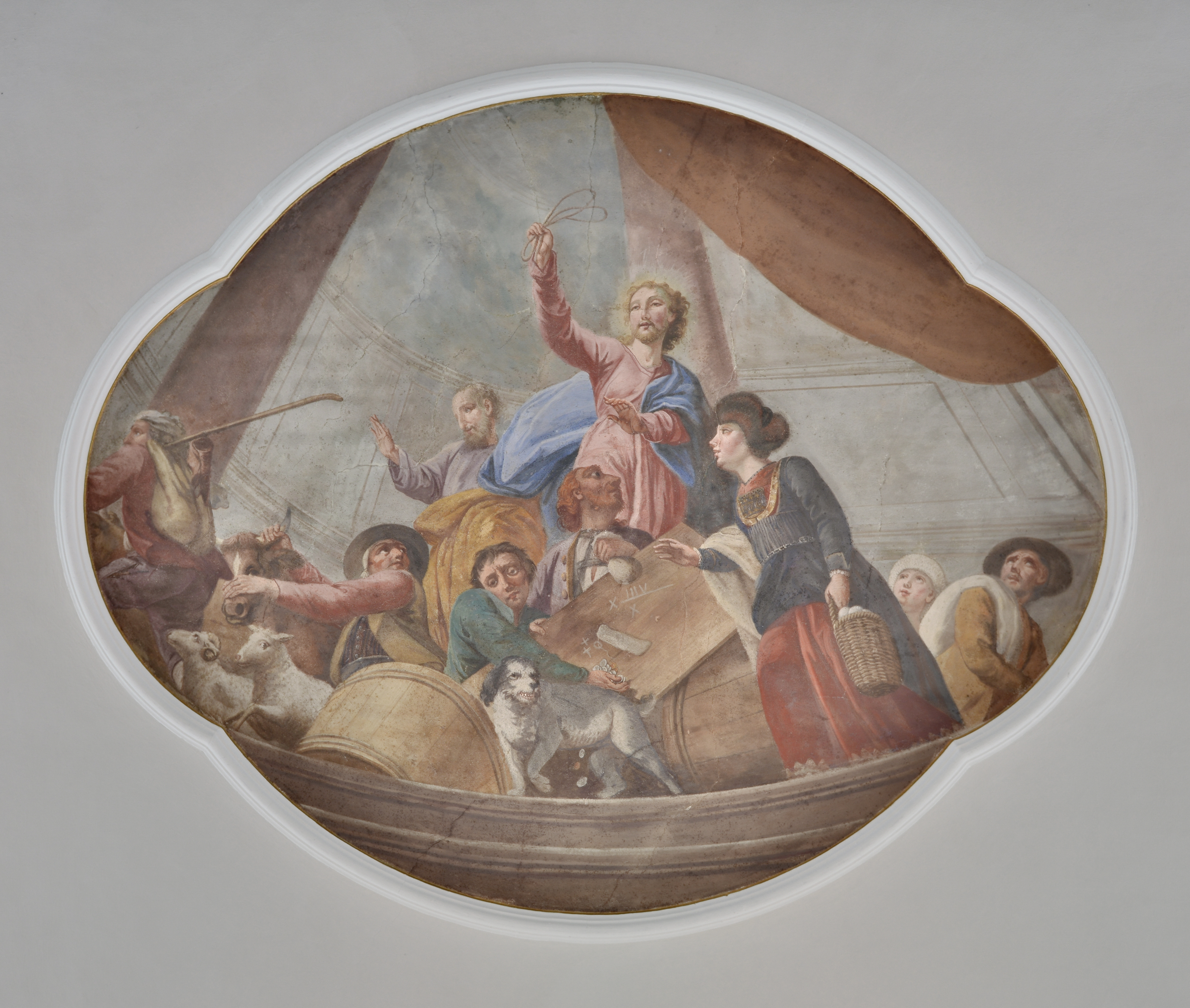 Pfarrkirche: Unsere Liebe Frau Mariä Heimsuchung in Langenegg.